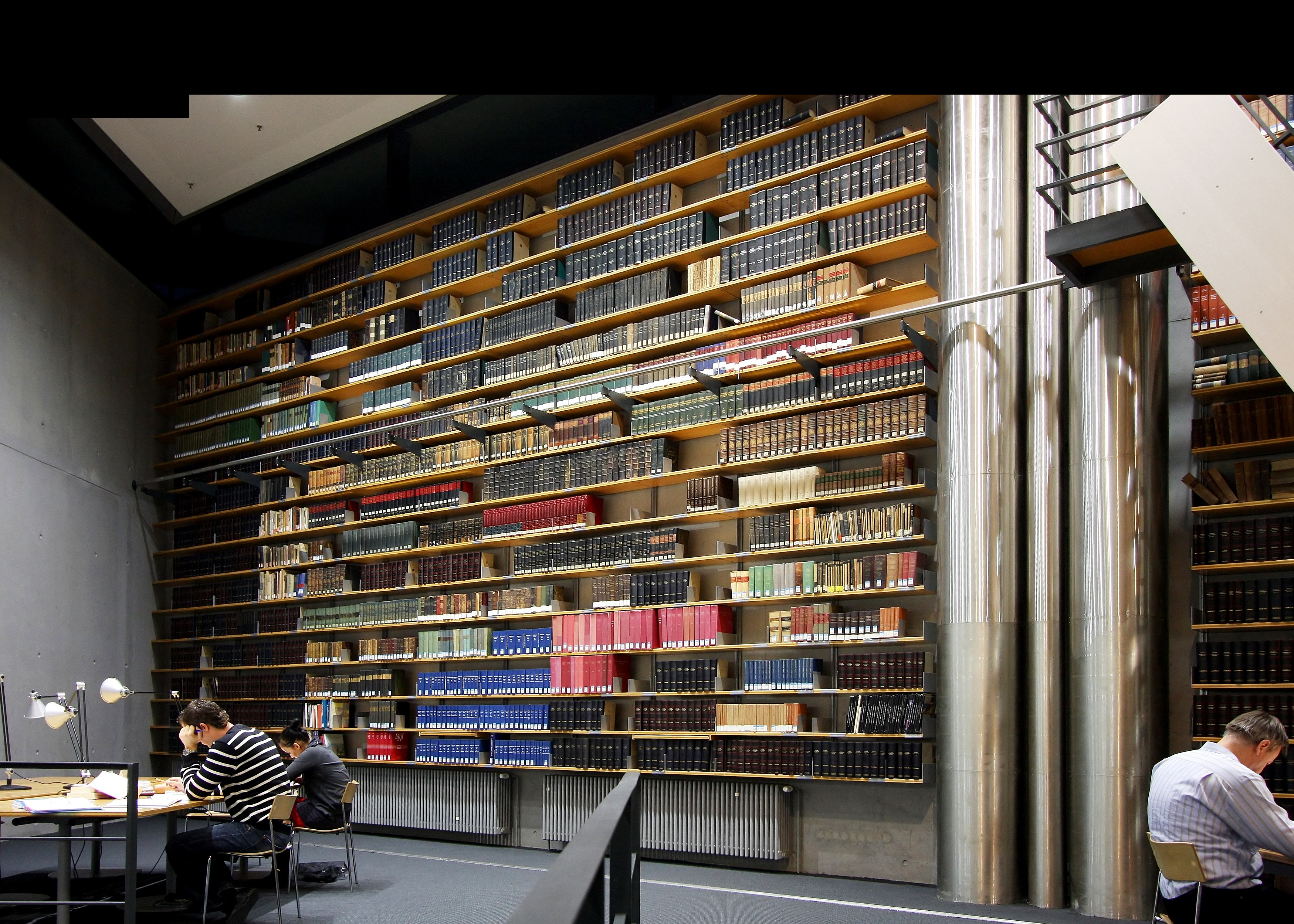 Deutsche Nationalbibliothek Frankfurt am Main: Lesesaal